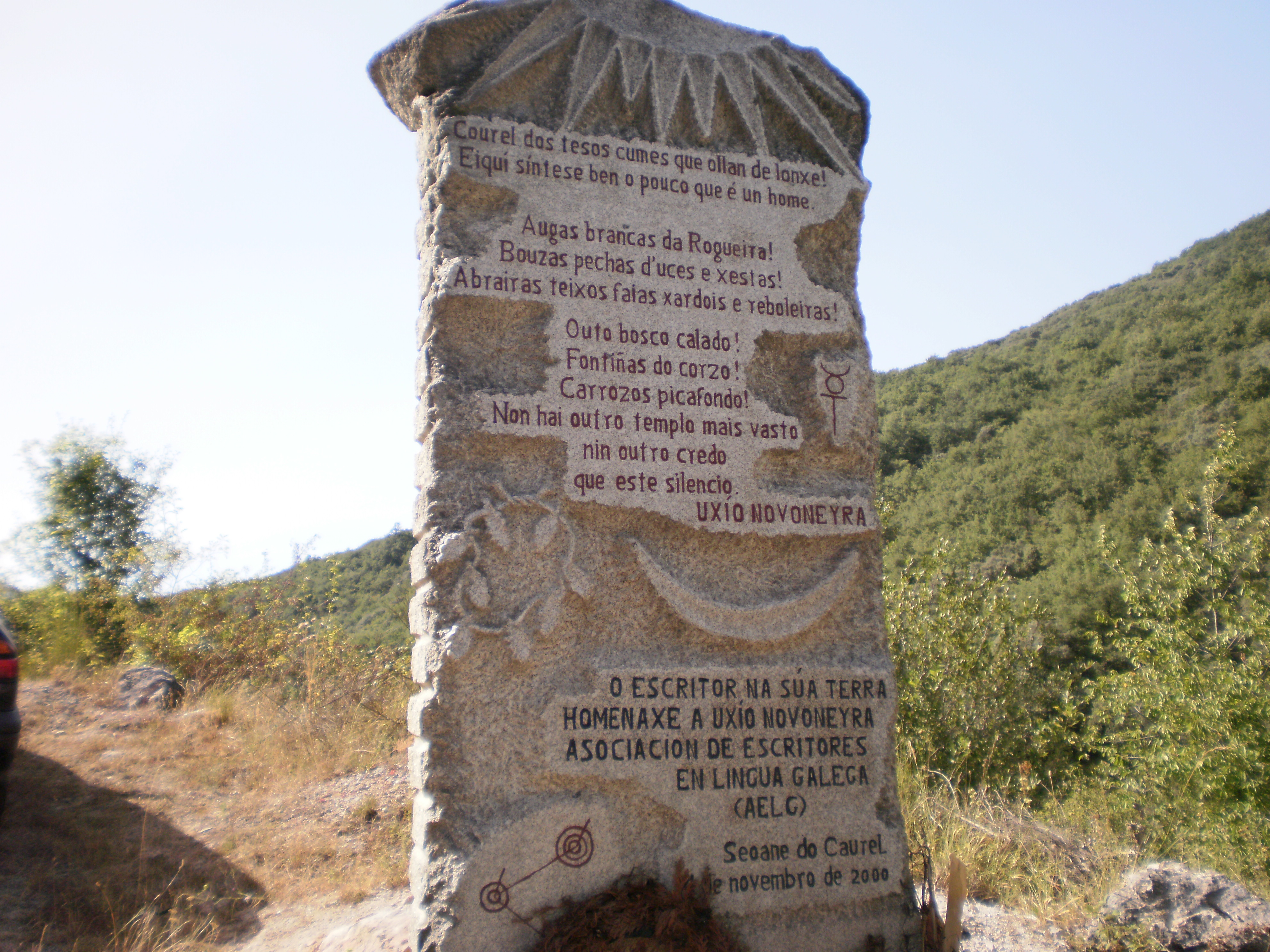 Monumento da AELG no Courel cun poema de Uxío Novoneyra